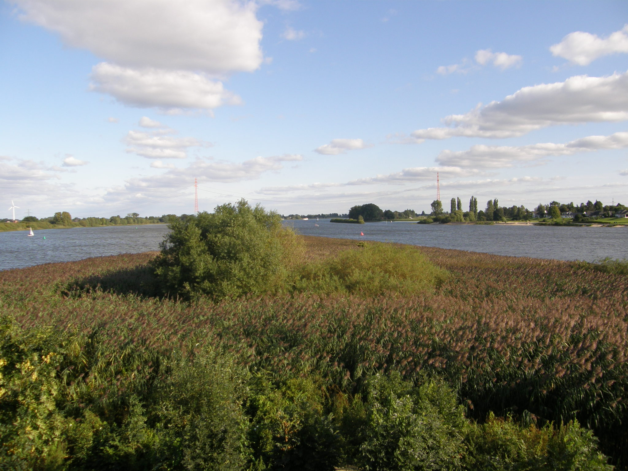 Bunthäuser Spitze Hamburg Wilhelmsburg Elbe